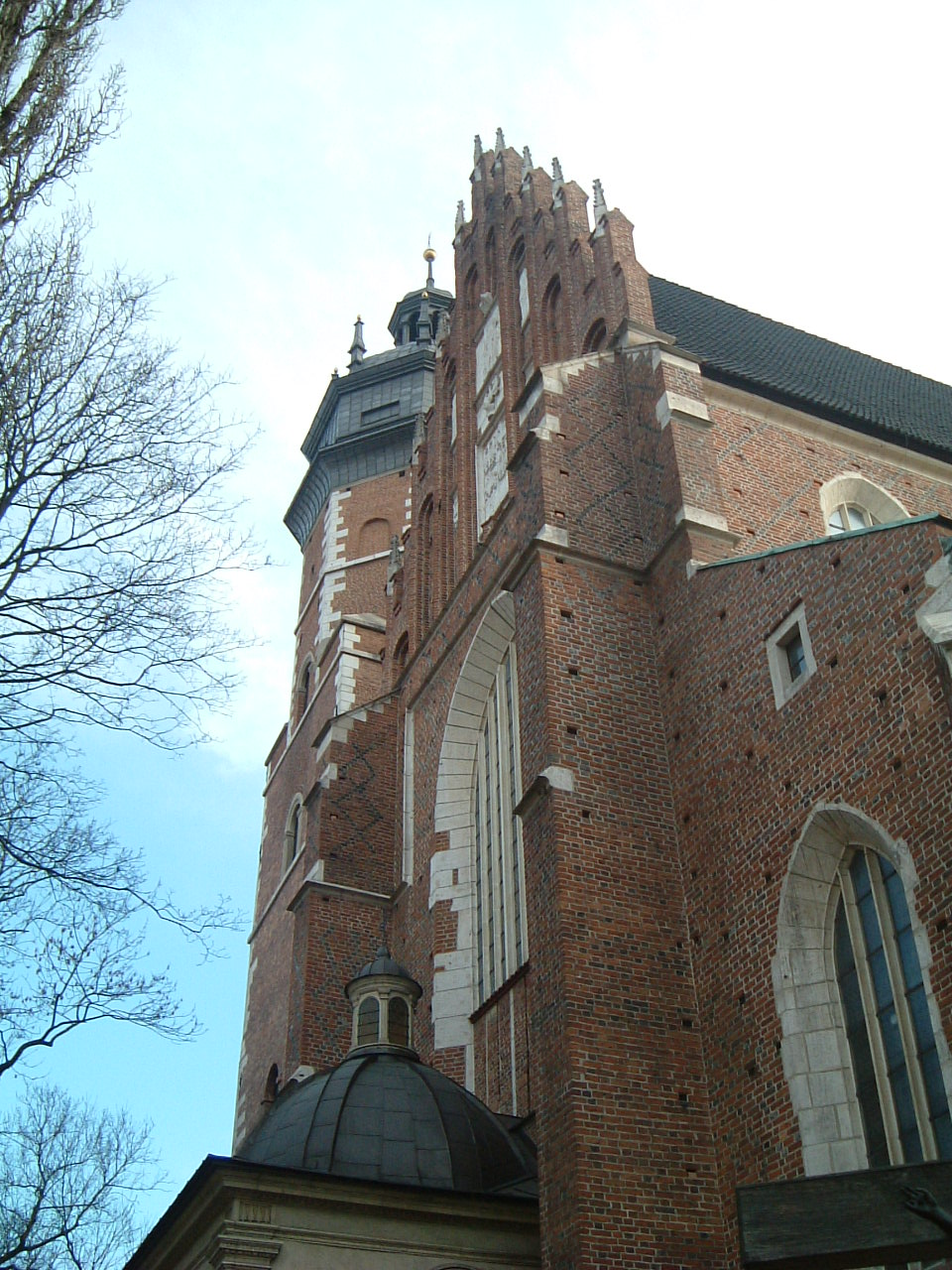 Author: Przemyslaw "Tukan" Grudnik